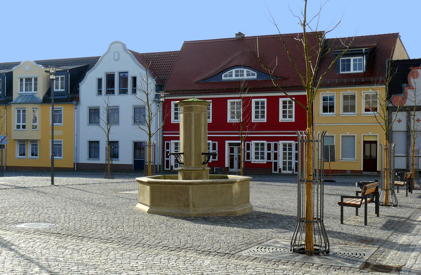 Neu entstandener Kleiner Marktplatz mit Saebisch Brunnen westlich des Bürgerhaus Spremberg.